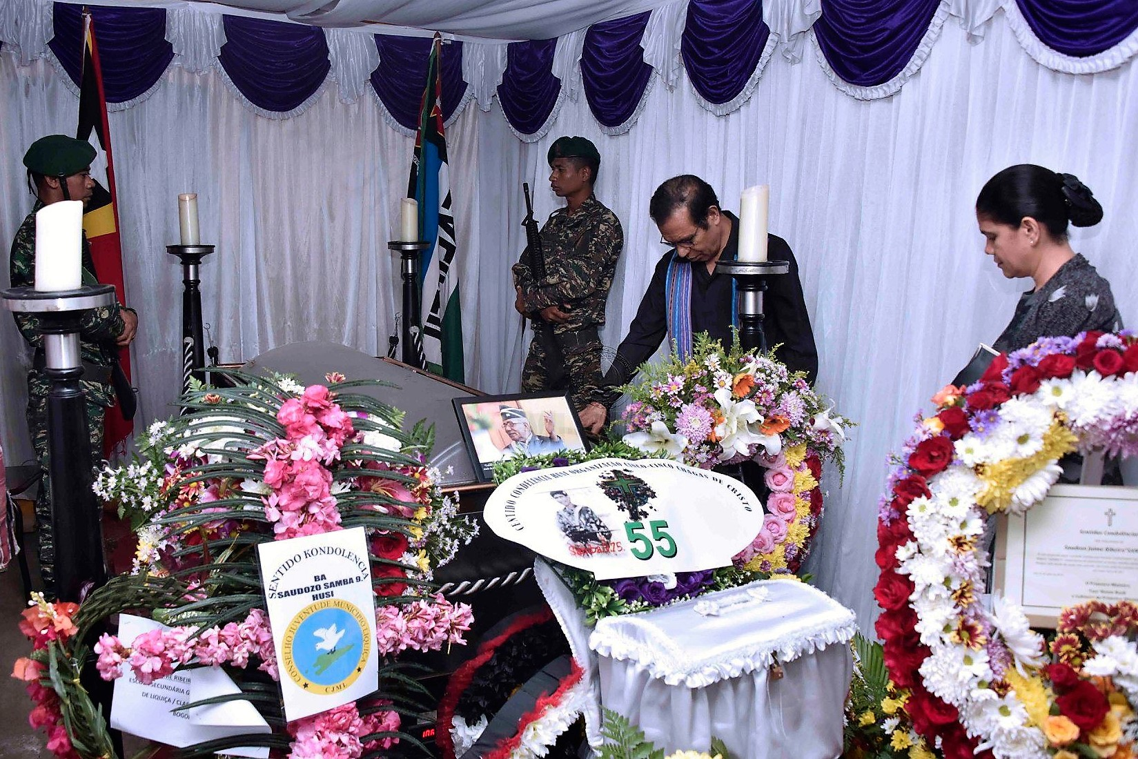 Taur Matan Ruak und Isabel da Costa Ferreira beim Begräbnis von Jaime Ribeiro (Samba 9)